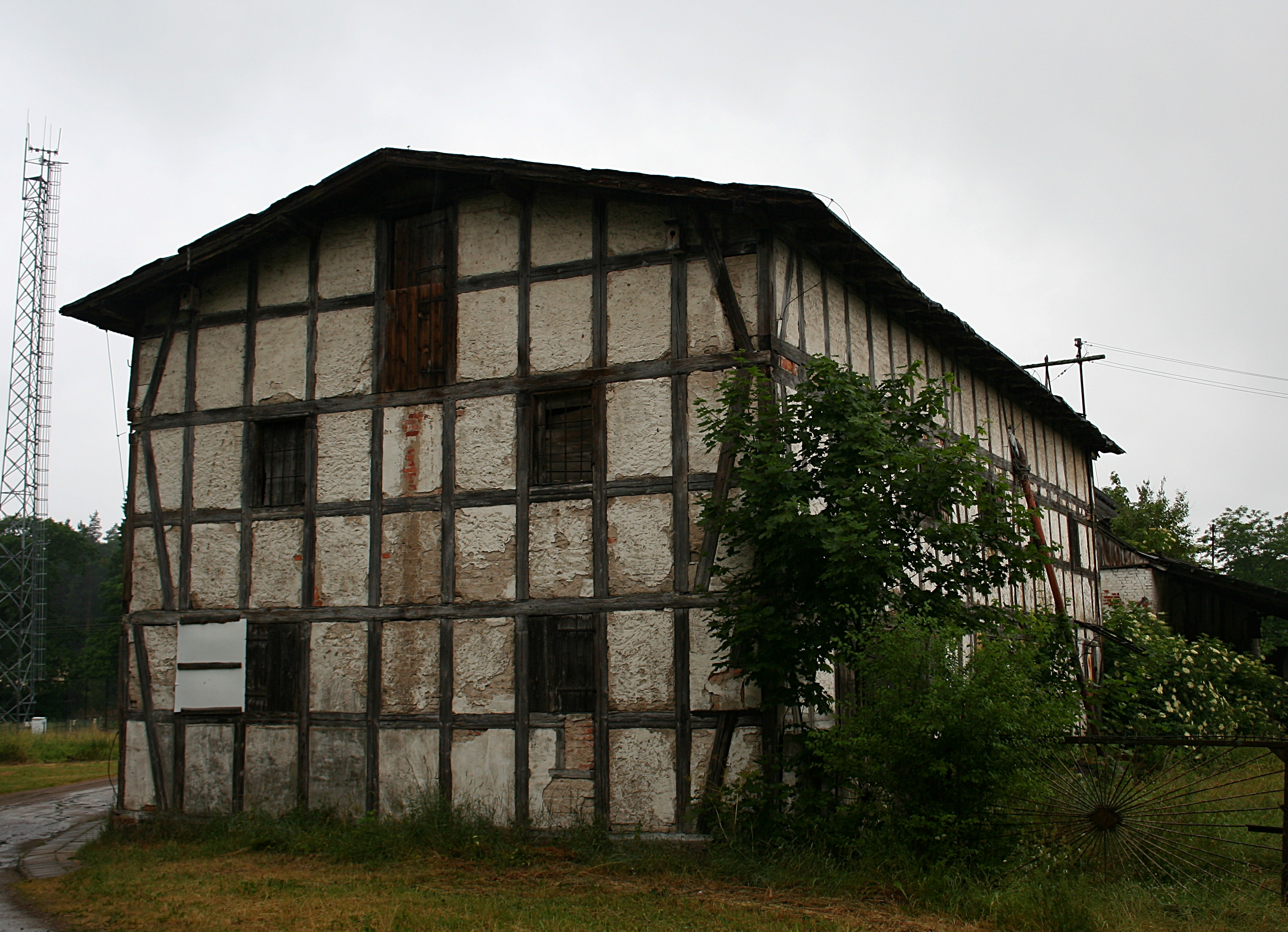 Spichlerz w miejscowości Jasień, powiat bytowski.